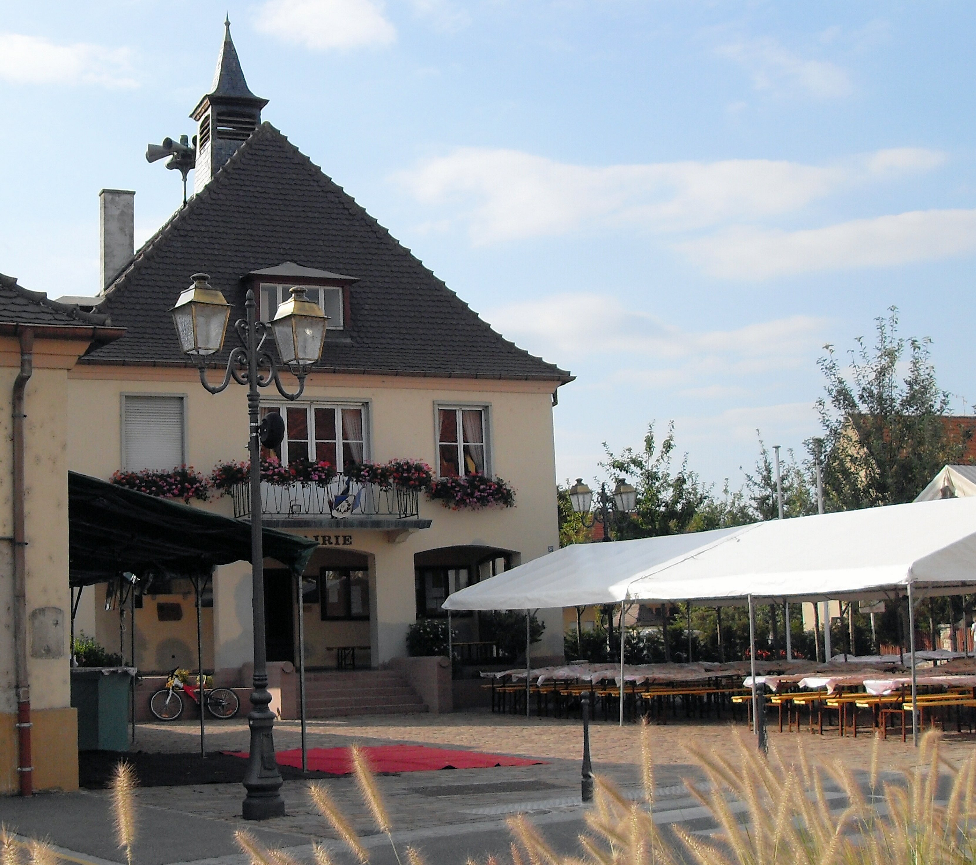 La mairie de Jebsheim